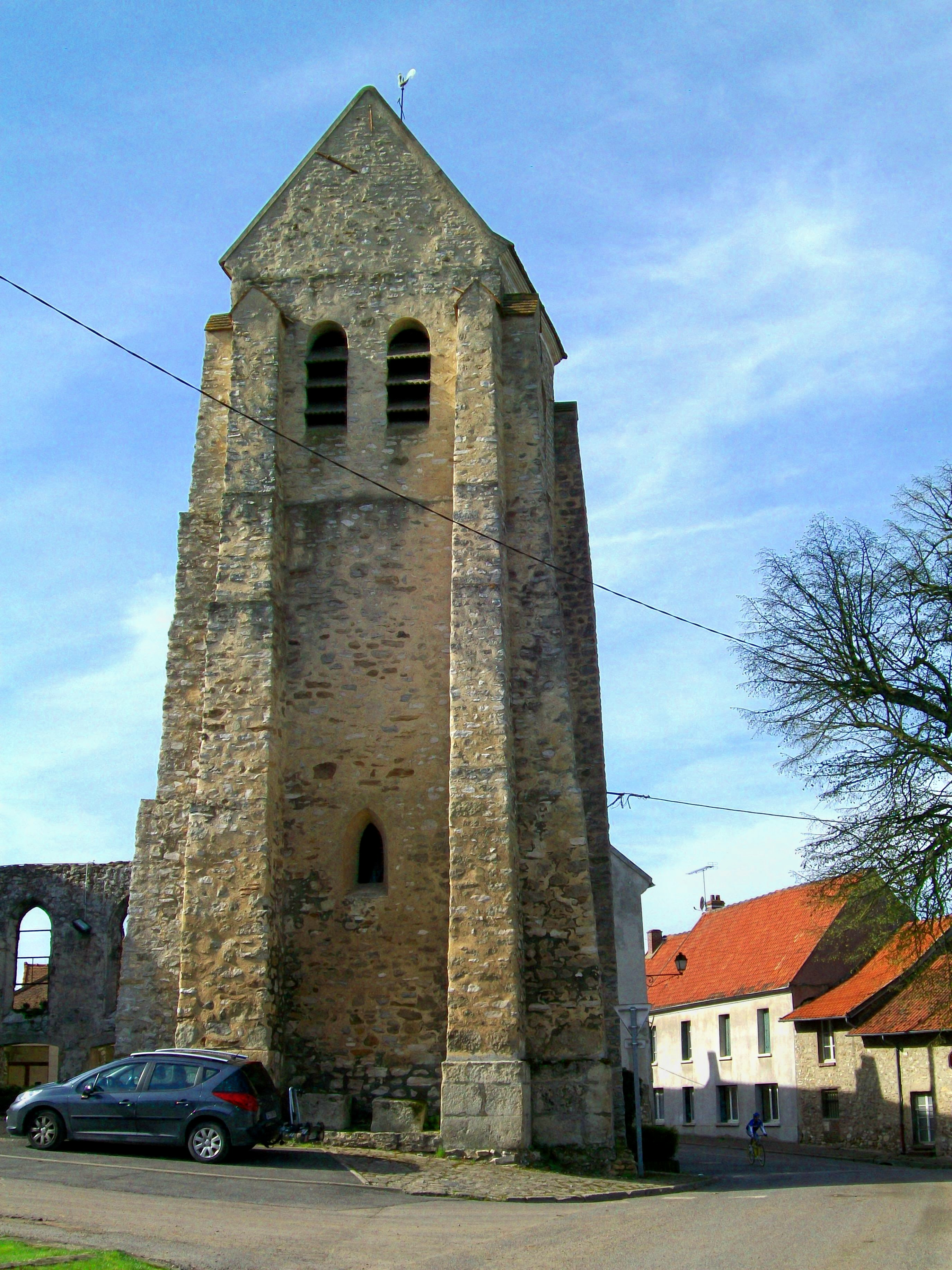 Tour de l'église Saint-Léger, du XIIIe siècle. C'est la partie la plus ancienne de l'église.